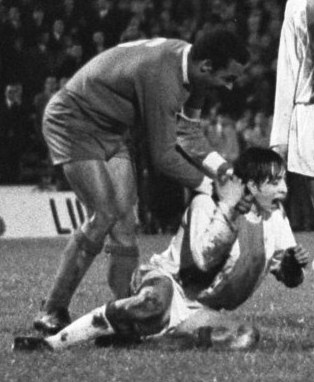 Coluna pakt Cruijff bij de nek tijdens de halve finale Europacup I Ajax - Benfica.